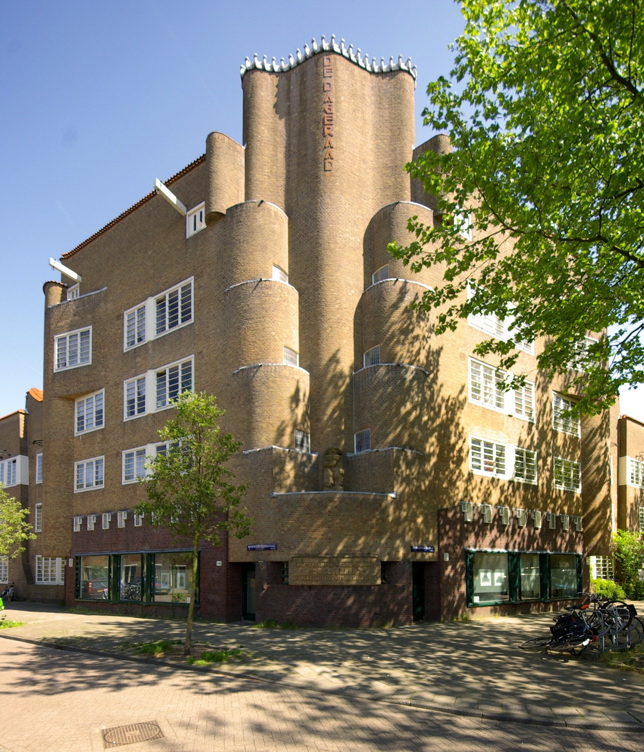 Complex van de woningbouwvereniging De Dageraad (1918-1923) in Amsterdam, architecten: Michel de Klerk en Piet Kramer 27″ N, 4° 54′ 01.8″ E